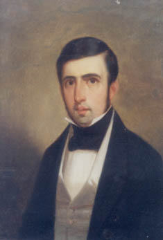 Obra da coleção Brasiliana Iconográfica.